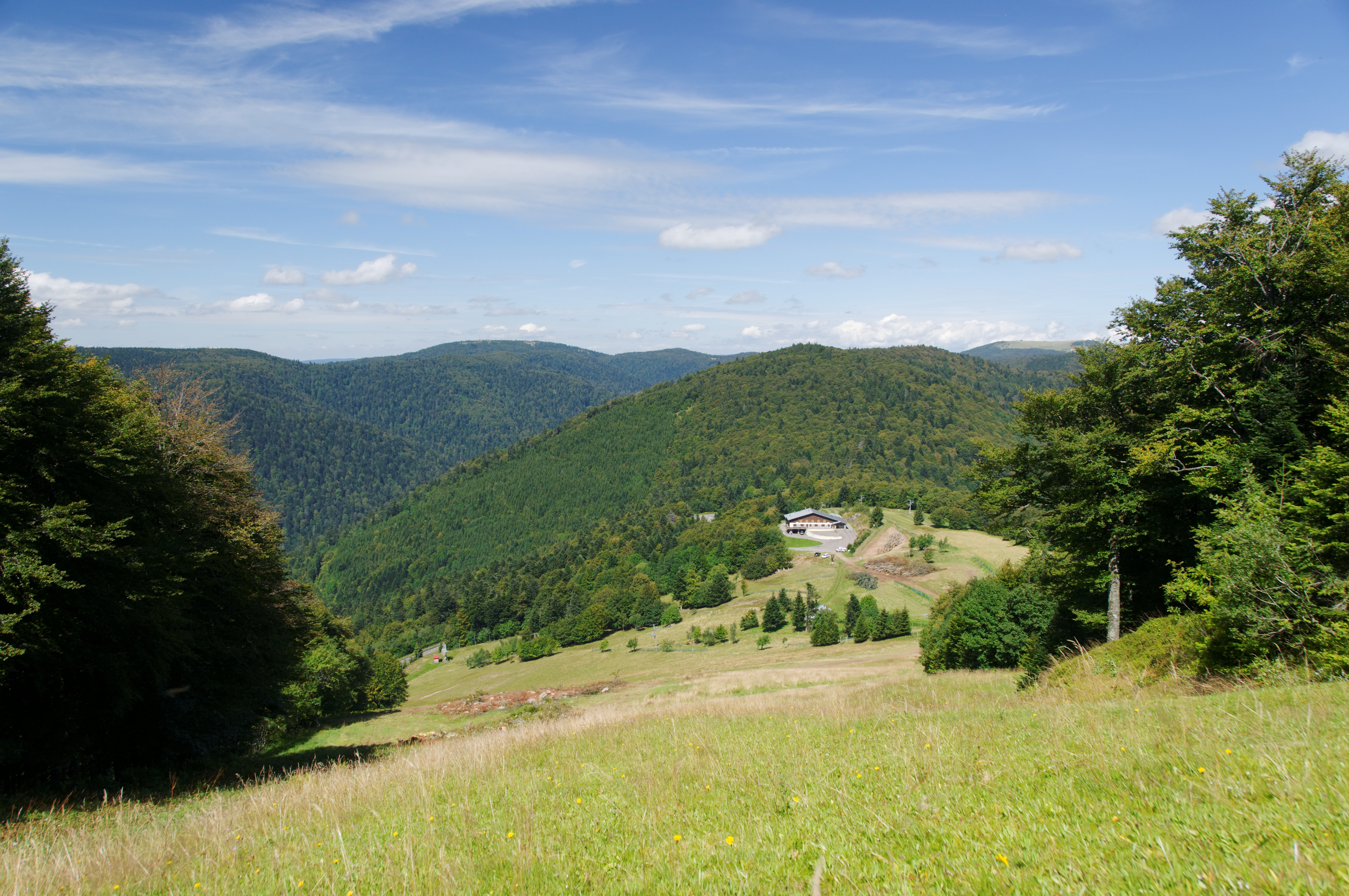 This photograph was taken with a Nikon D300 Vue sur le restaurant, situé en contrebas, depuis le sommet de la Planche des Belles Filles.